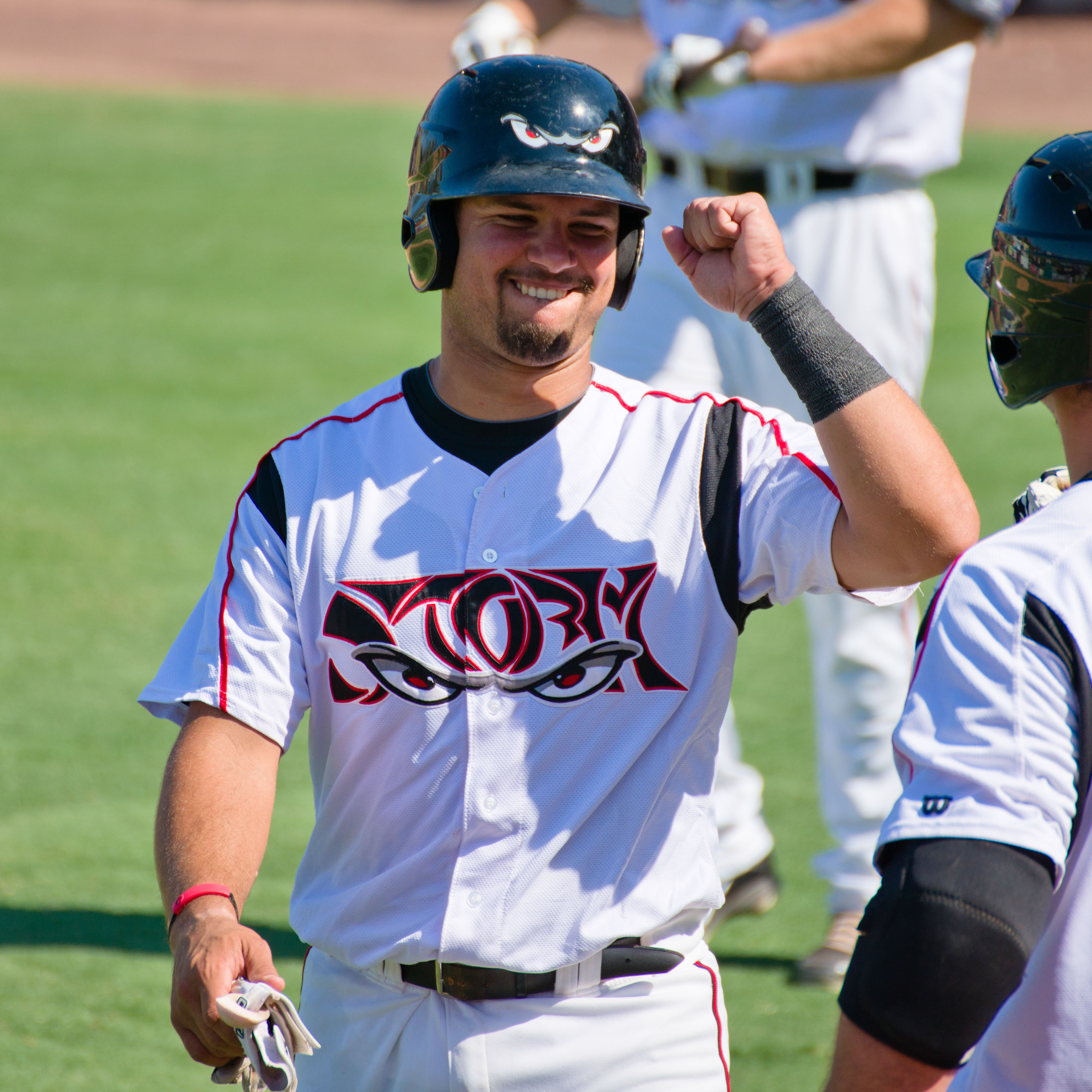 Eddy Rodríguez